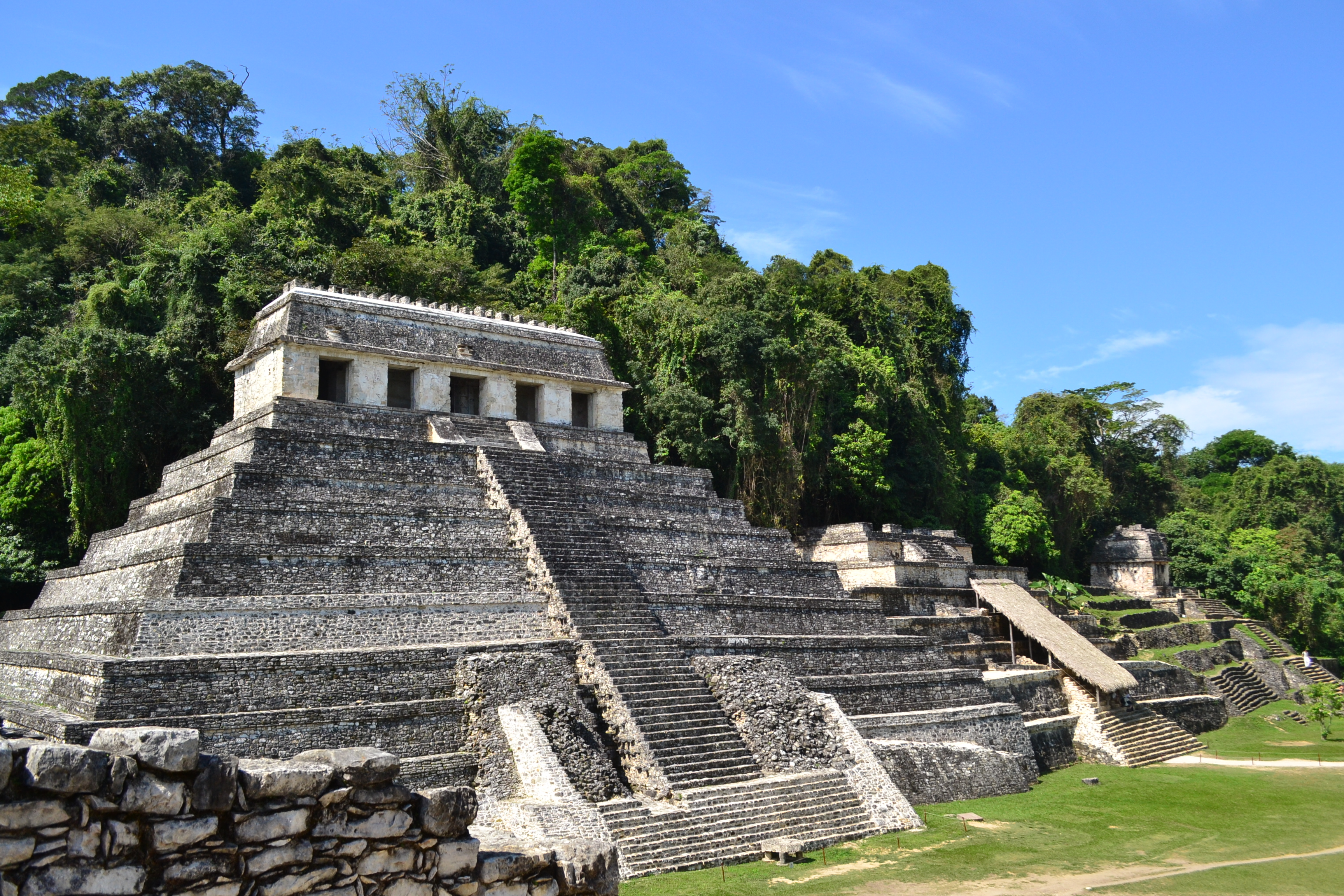 Un lugar magico que debes de visitar.